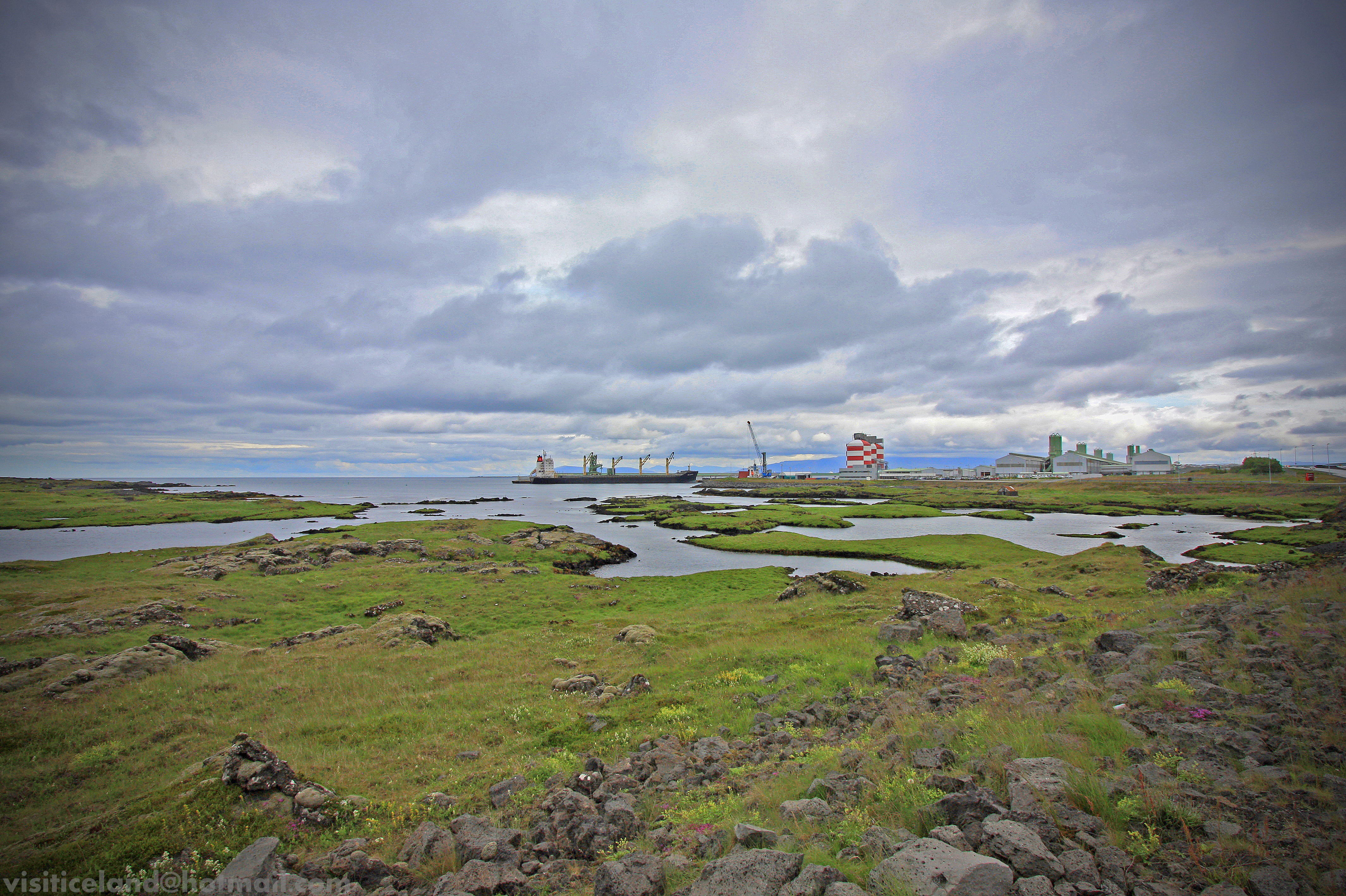 Landscape Design